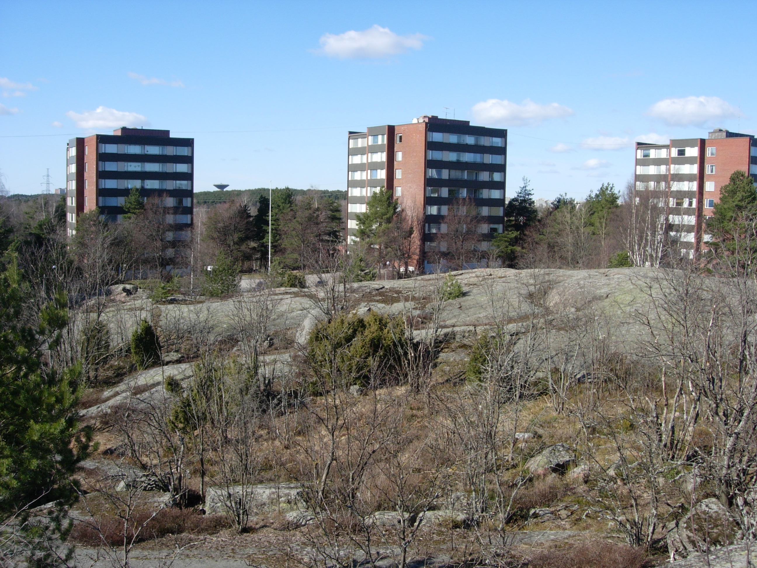 Mullintie 2–jotain, Kastu, Turku